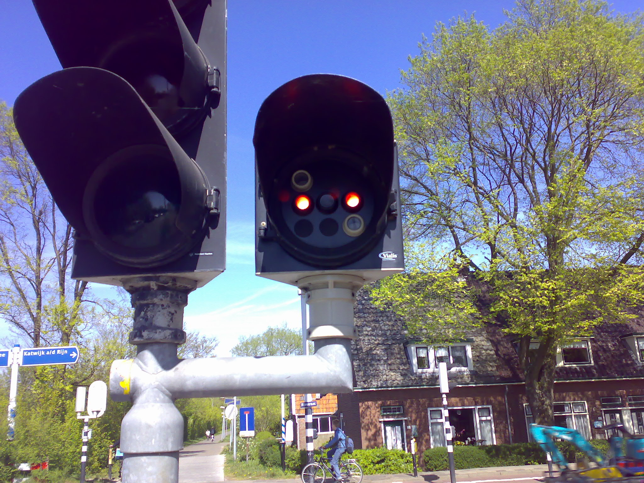 Foto van een negenoog aan de Callaoweg te Katwijk